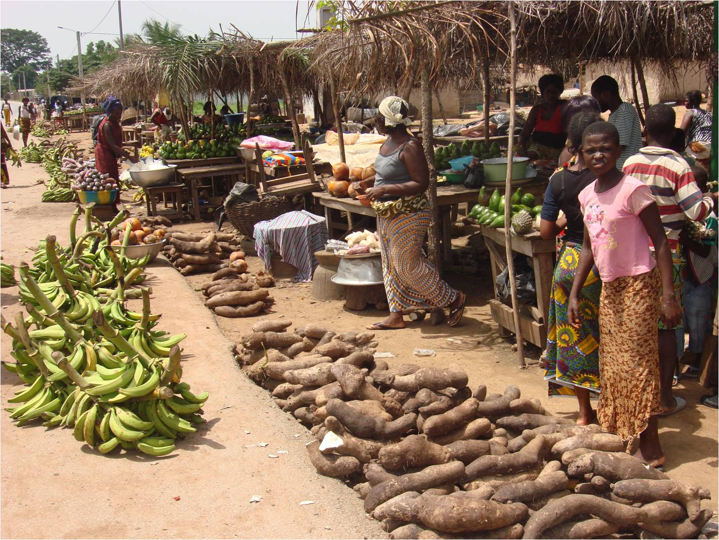 marché de produits vivriers en bordure d'une route nationale (Côte d'Ivoire)